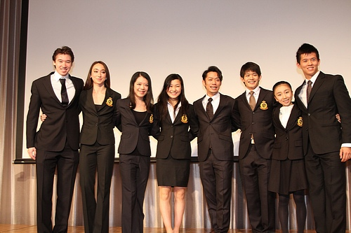 Команда Японии на командном чемпионате мира по фигурному катанию 2012. Слева на право: Крис Рид, Кэти Рид, Акико Судзуки, Канако Мураками, Дайсукэ Такахаси, Такахико Кодзука, Наруми Такахаси, Мервин Тран.